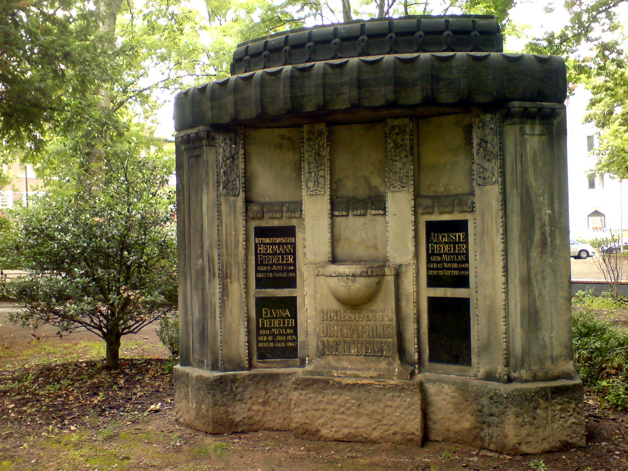 Das Grabmal für Hermann Fiedeler und seine beiden Frauen Auguste Meylan und Elvina Meylan ...